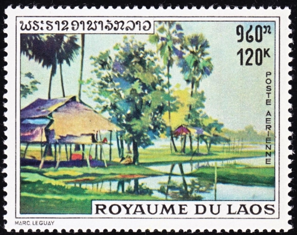 peinture de marc Leguay (timbre du Laos 1970)